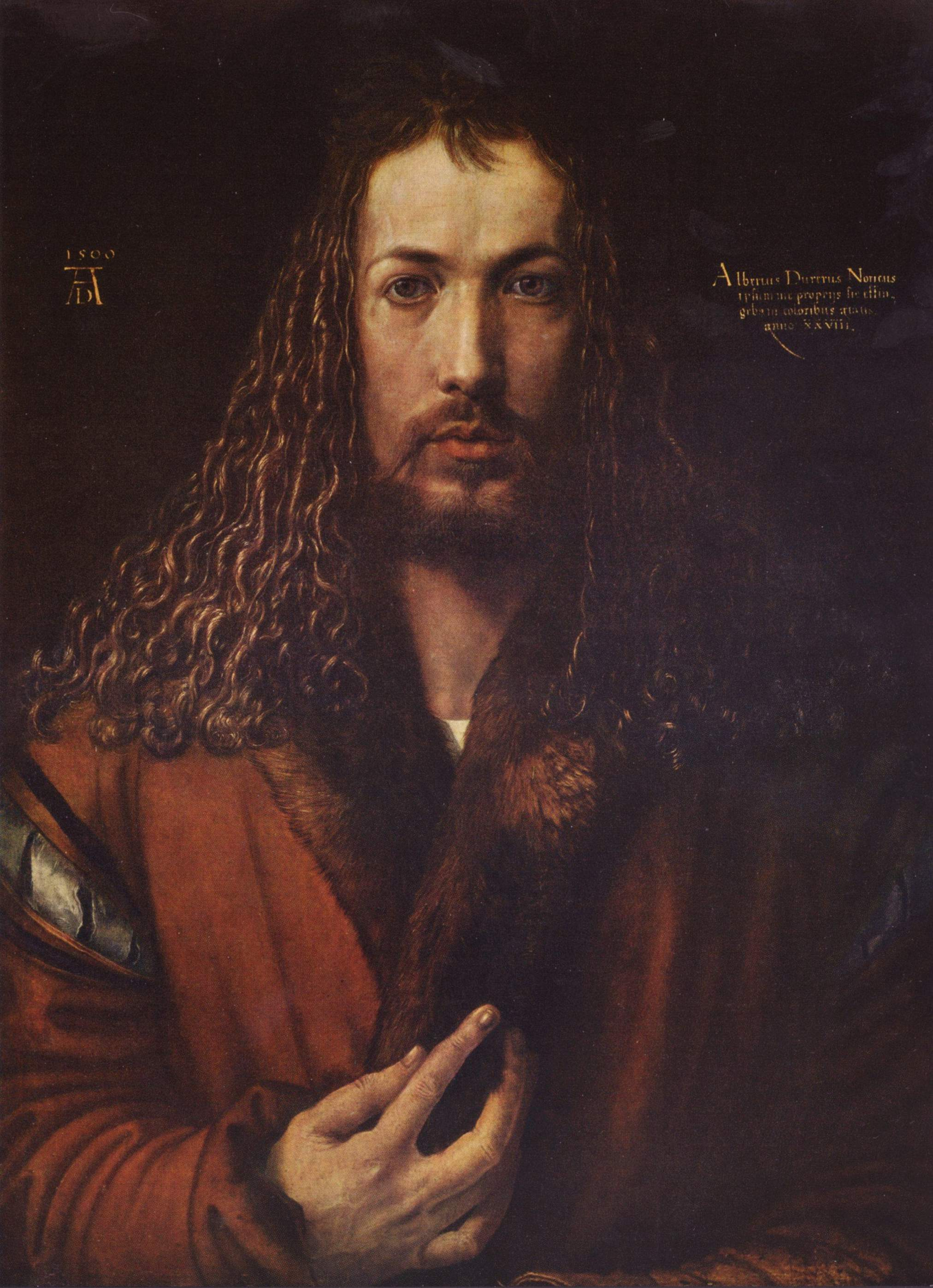 Frontalporträt mit Idealisierung vergleichbar mit Christusdarstellungen; betonter Blick und die schöpferische Hand als Werkzeuge des Künstlers